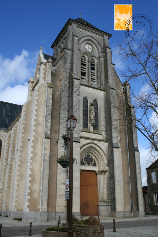 Eglise de La Planche